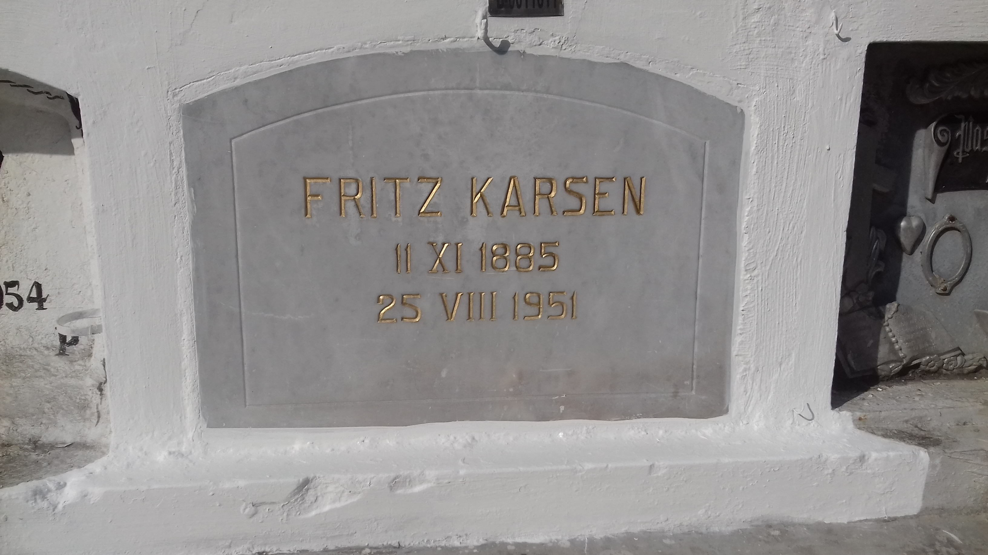 Grab von Fritz Karsen (15.09.2019 Ort: Friedhof Guayaquil: PUERTA # 06 CUERPO # 0892 BOVEDA # 0011611 FILA # 1